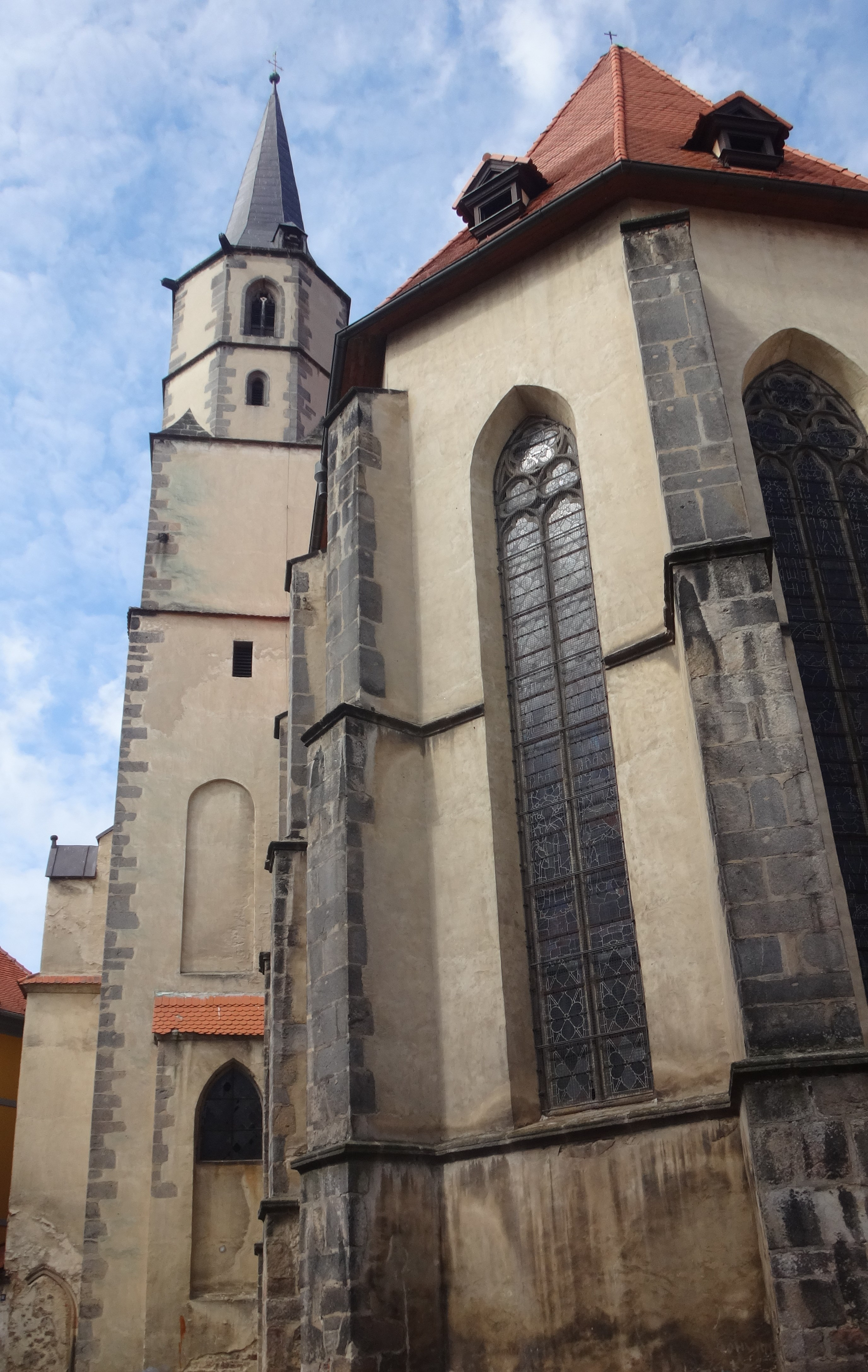 pohled z Františkánského náměstí